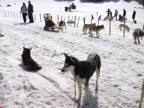 Campionato Italiano Sleddog Bagolino, Loc. Gaver - 1